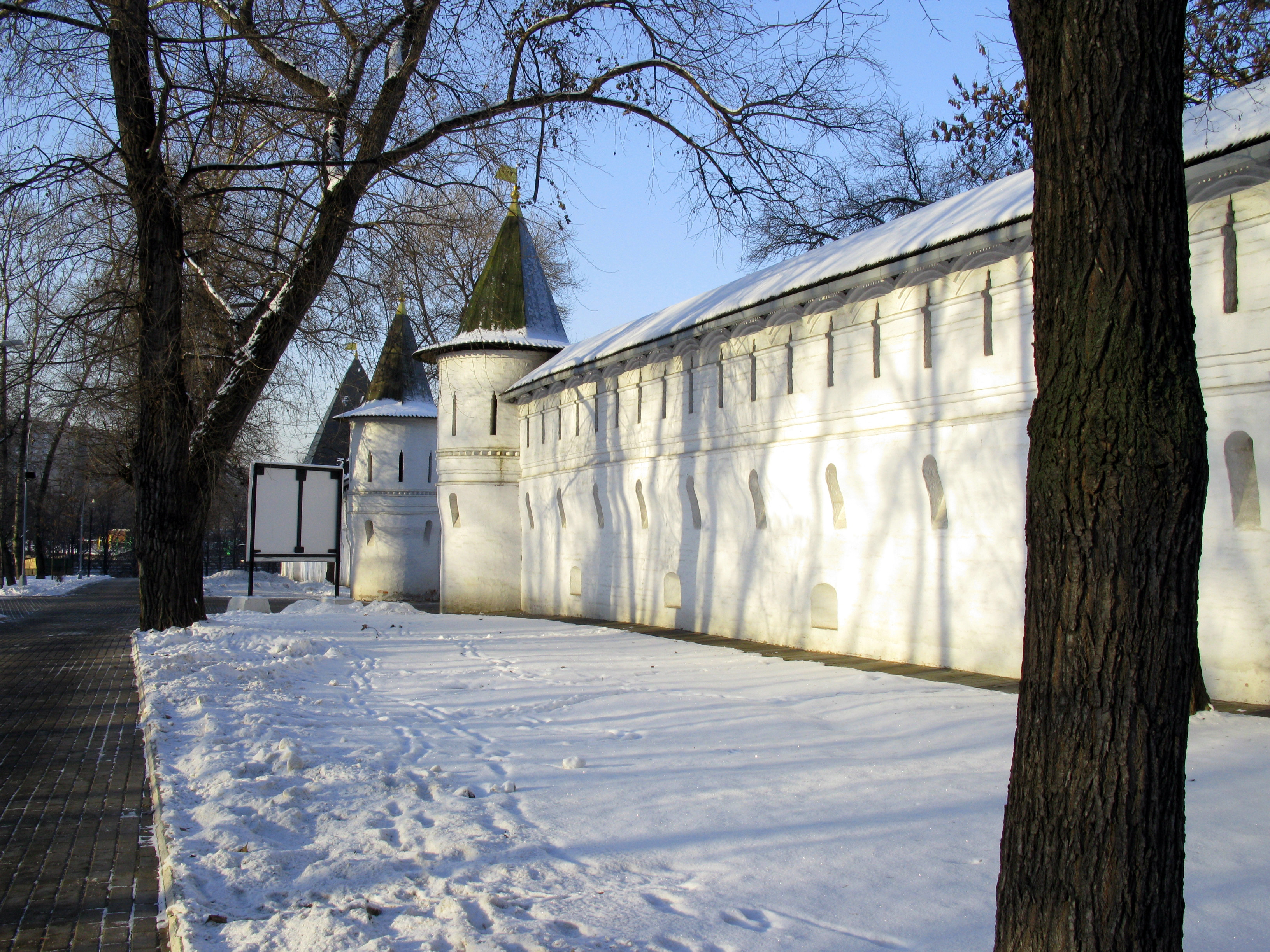 Андроников монастырь